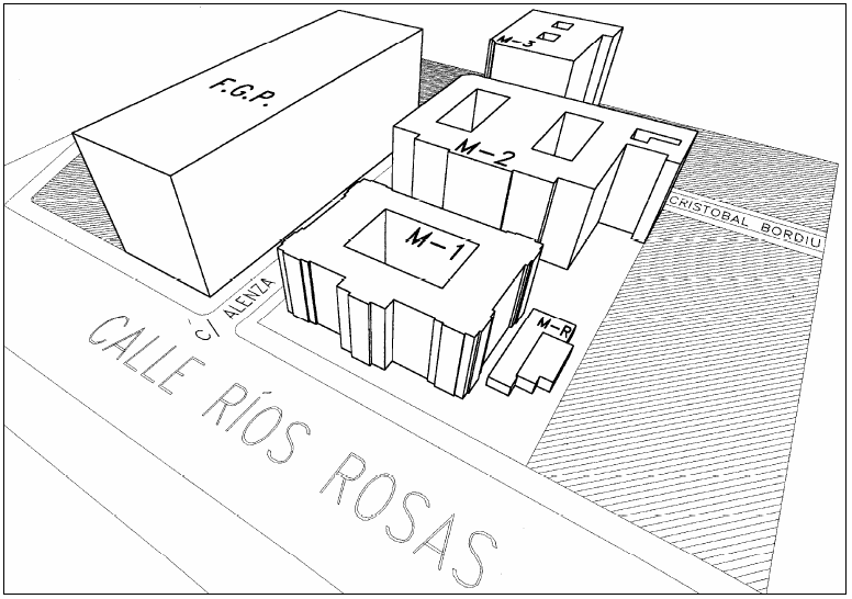 Partes de escuela de Minas de Madrid